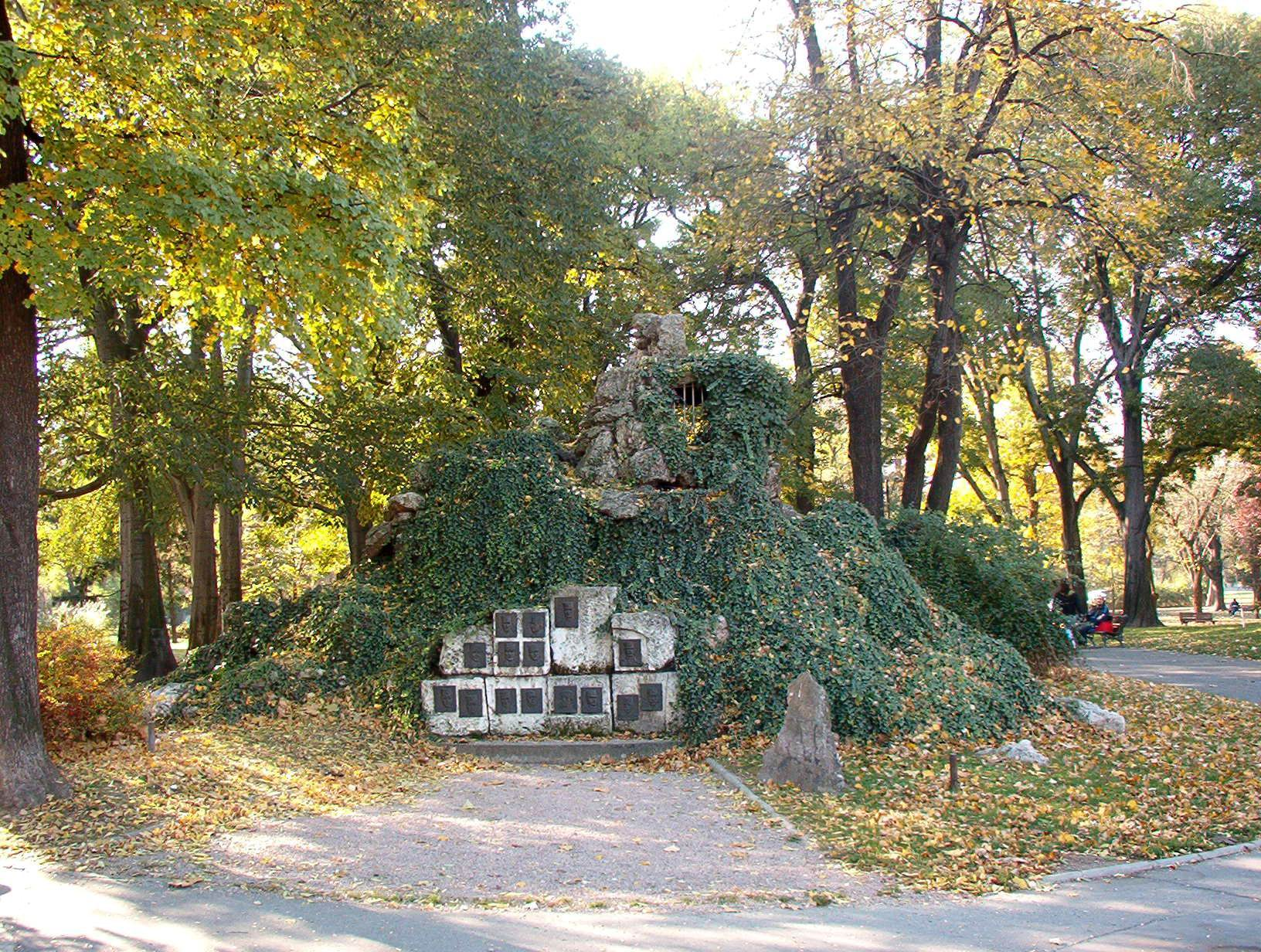 Осматрачница српске врховне команде на Кајмакчалану.